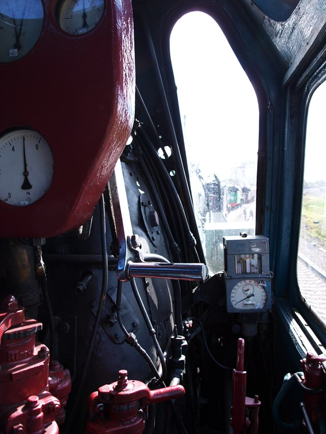 Вид из будки машиниста паровоза П36-0031